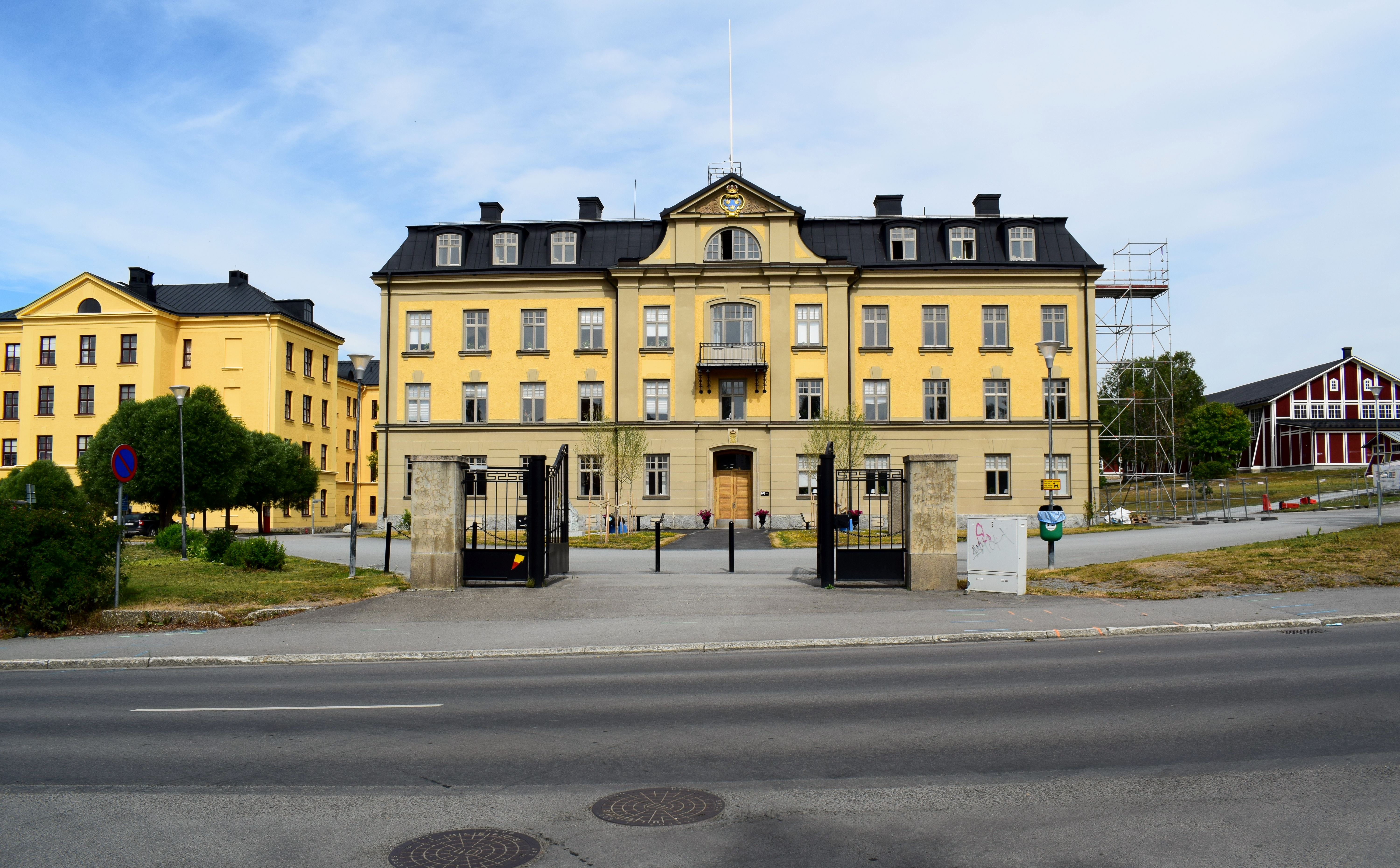 Kanslihuset (sett från Fältjägargränd) vid före detta Jämtlands fältjägarregemente.